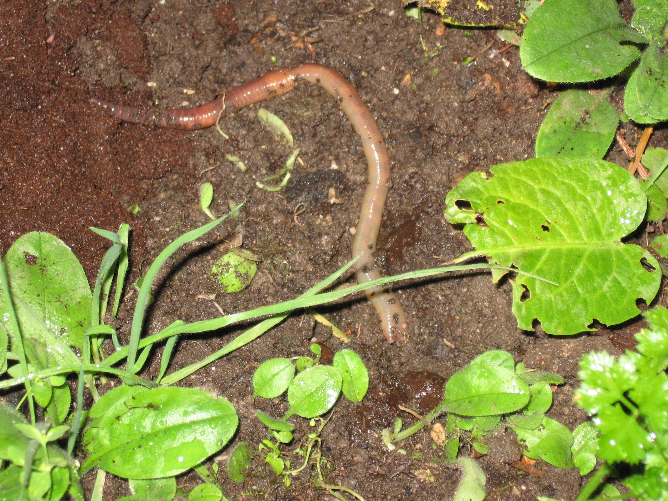 Lumbricus terrestris (Nachtaufnahme)